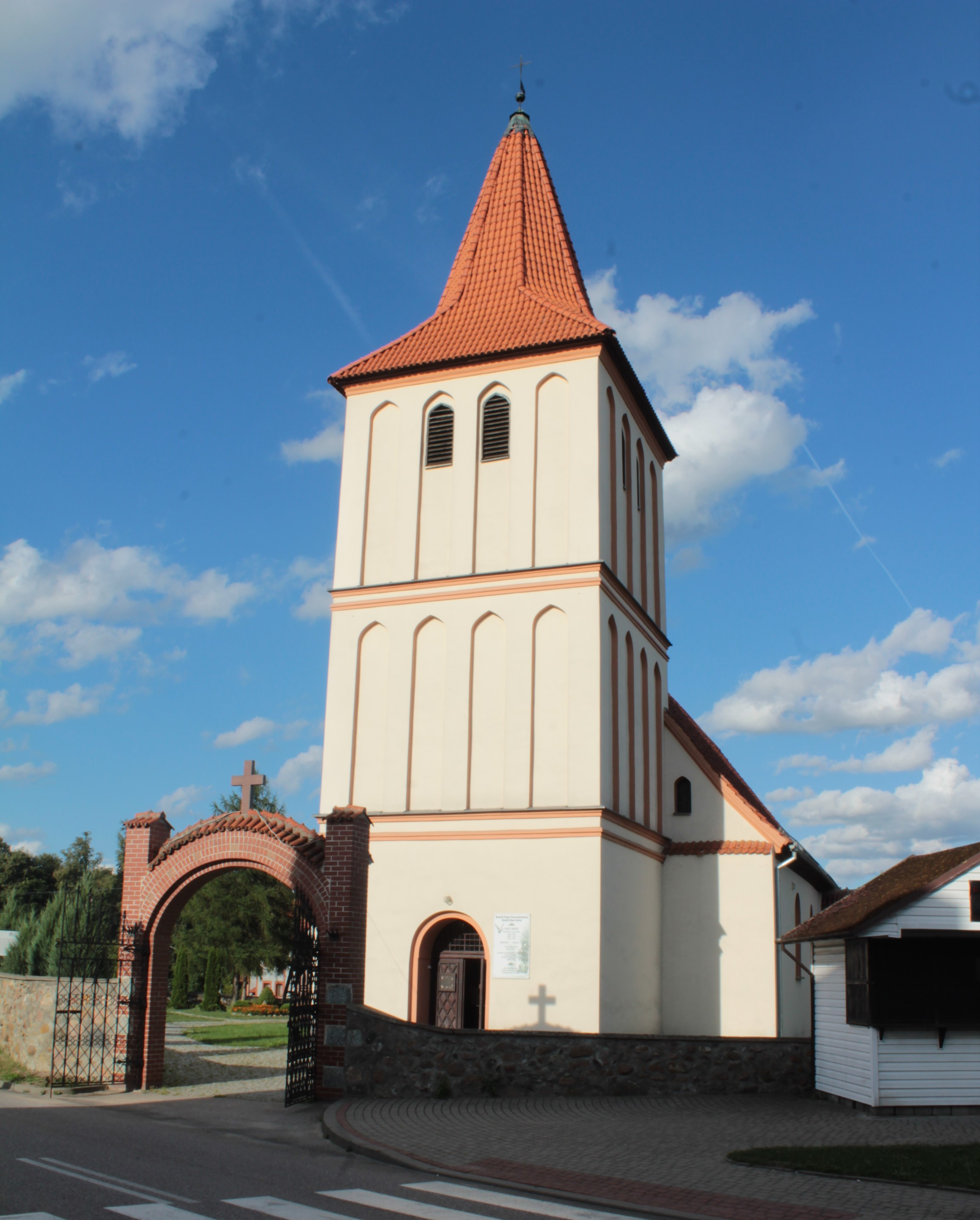 Wieża kościoła w Starych Juchach